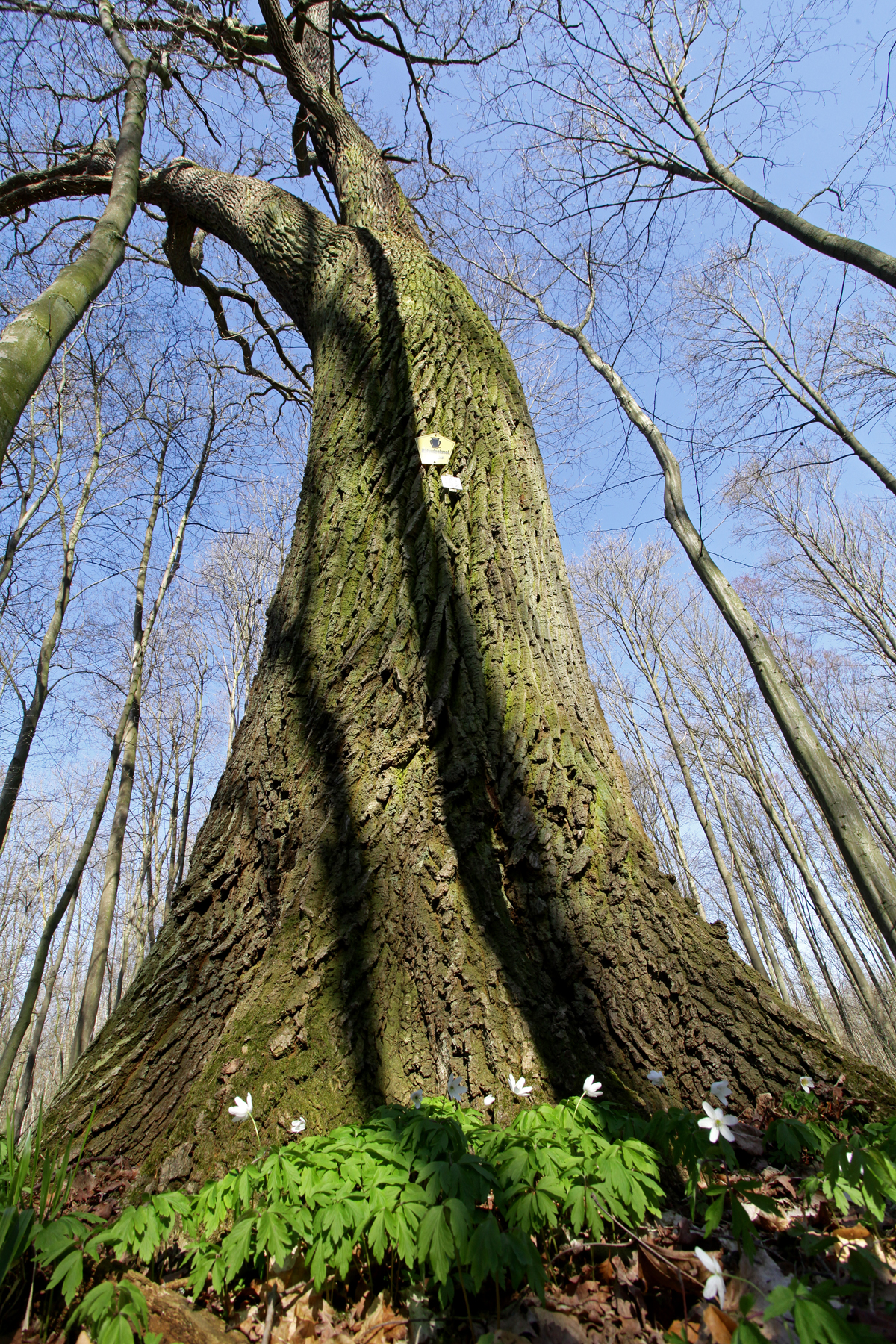 NSG Friedrichsmoor, Stiel-Eiche (Naturdenkmal)